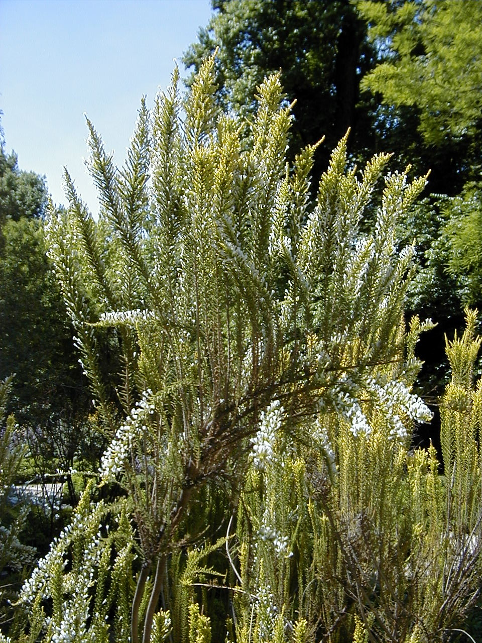 Fabiana imbricata. Real Jardín Botánico de Madrid.